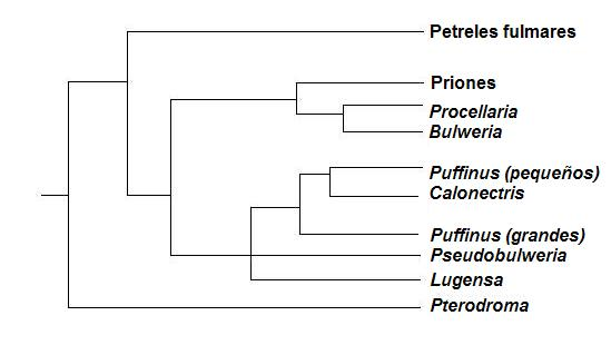 diagrama simplificado de las relaciones filogenéticas de la familia Procellariidae basado en Nunn & Stanley (1998) y Bretagnolle et al (1998)